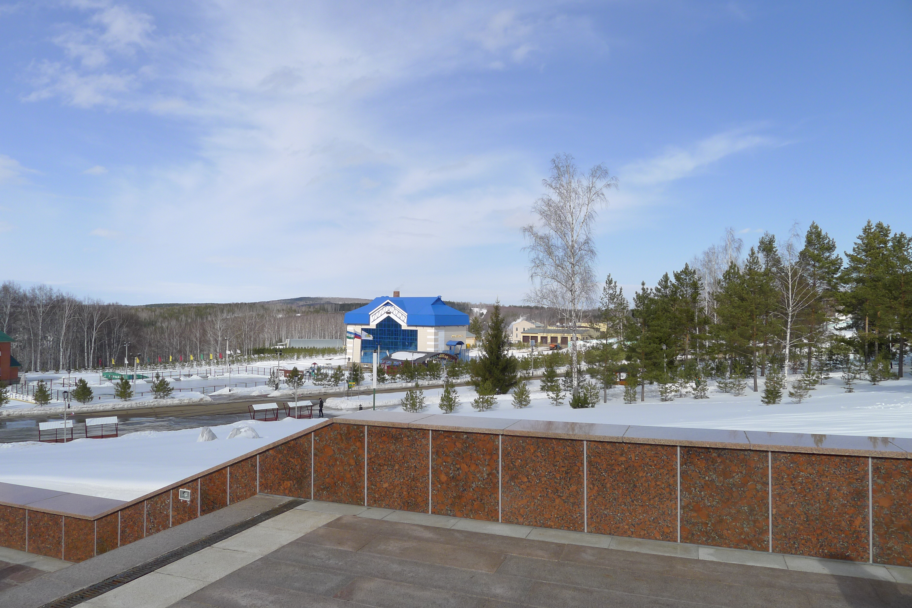 Саха тыла: Биики-сэминээр кыттыылаахтара "Янган-Тау" санаторийга. 2016 сыл кулун тутар 25 к.